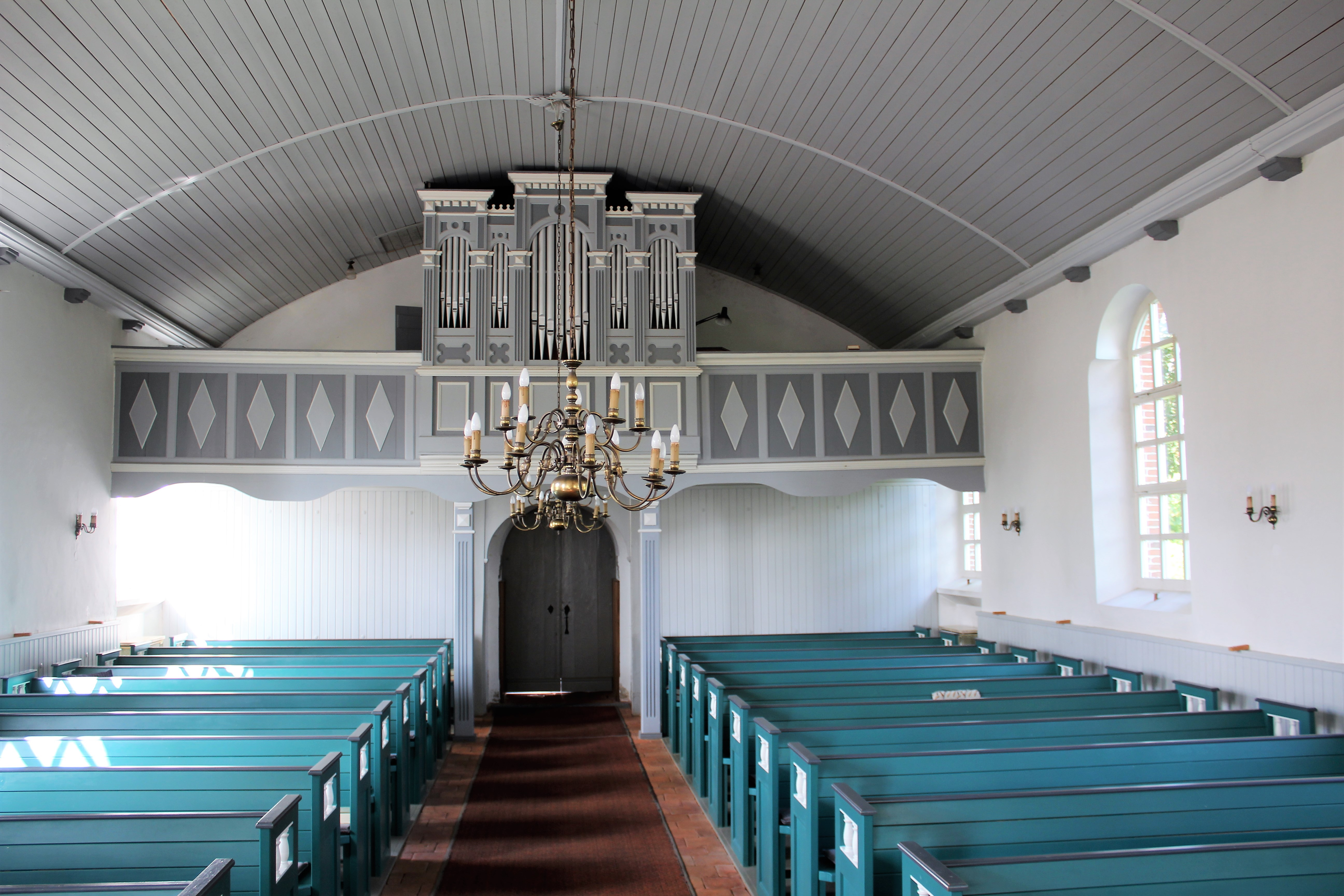 Ev.-reformierte Kirche Weenermoor, Landkreis Leer, Ostfriesland, Deutschland